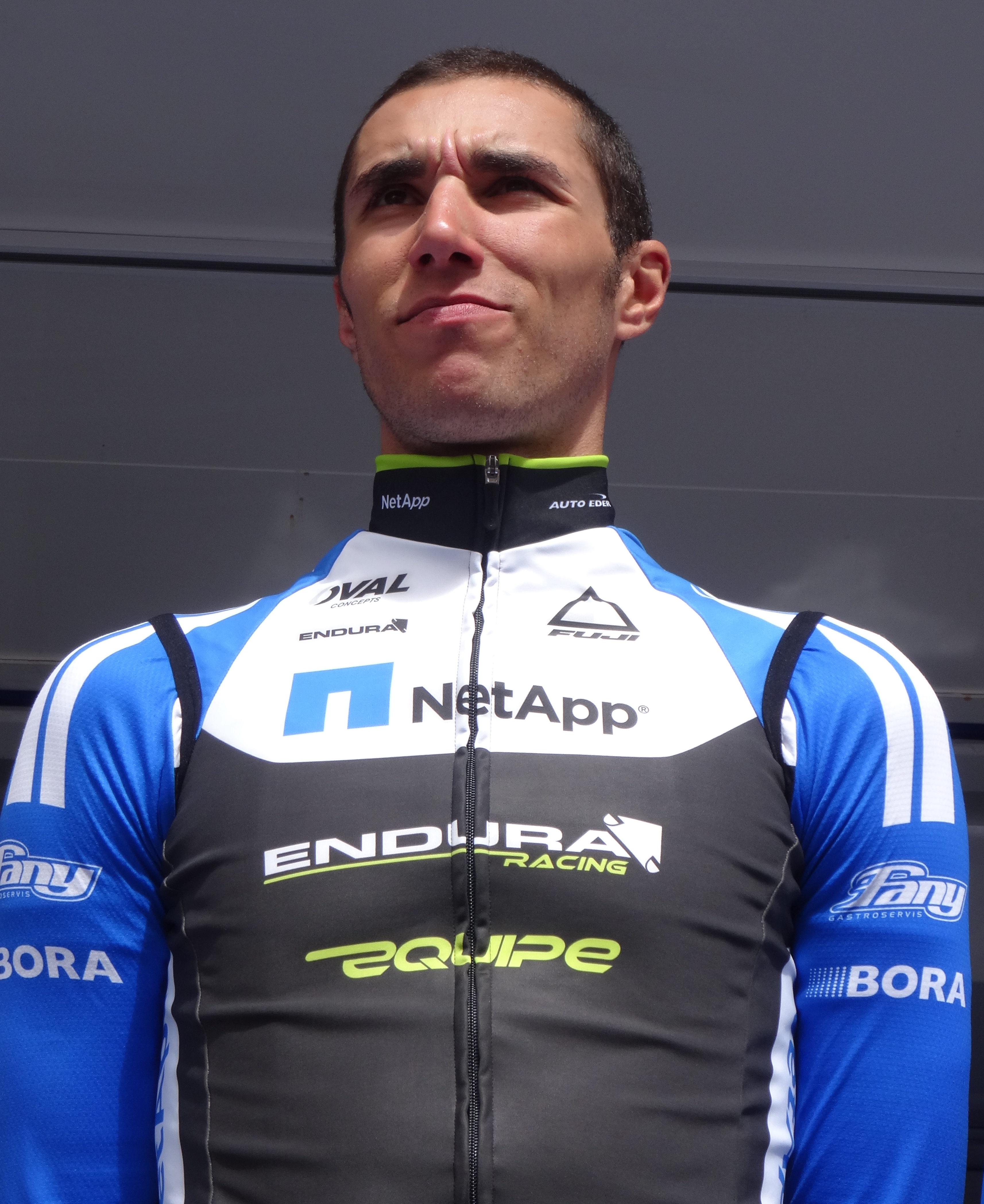 Reportage photographique réalisé le mercredi 7 mai 2014 au départ de la première étape de l'édition 2014 des Quatre jours de Dunkerque à Dunkerque, Nord, Nord-Pas-de-Calais, France. Depicted person: Blaž Jarc Depicted team: NetApp-Endura